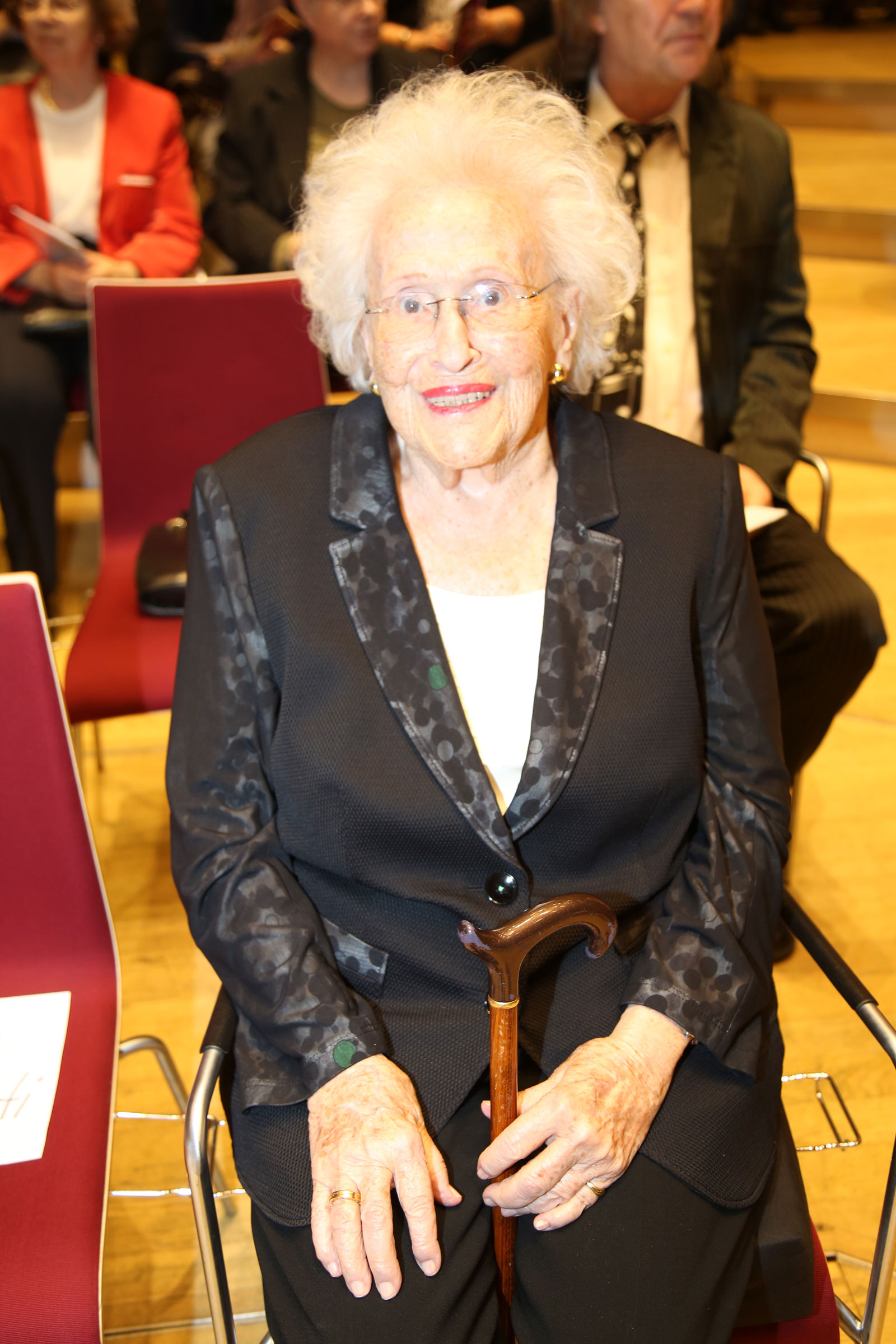 Hilde Zadek, geboren am 15. Dezember 1917 in Bromberg, Provinz Posen, eine deutsch-österreichische Opern-, Operetten-, Lied- und Konzertsängerin mit der Stimmlage Sopran. Arbeitete als Gesangspädagogin in Karlsruhe und in Wien. Namensgeberin für denweltw